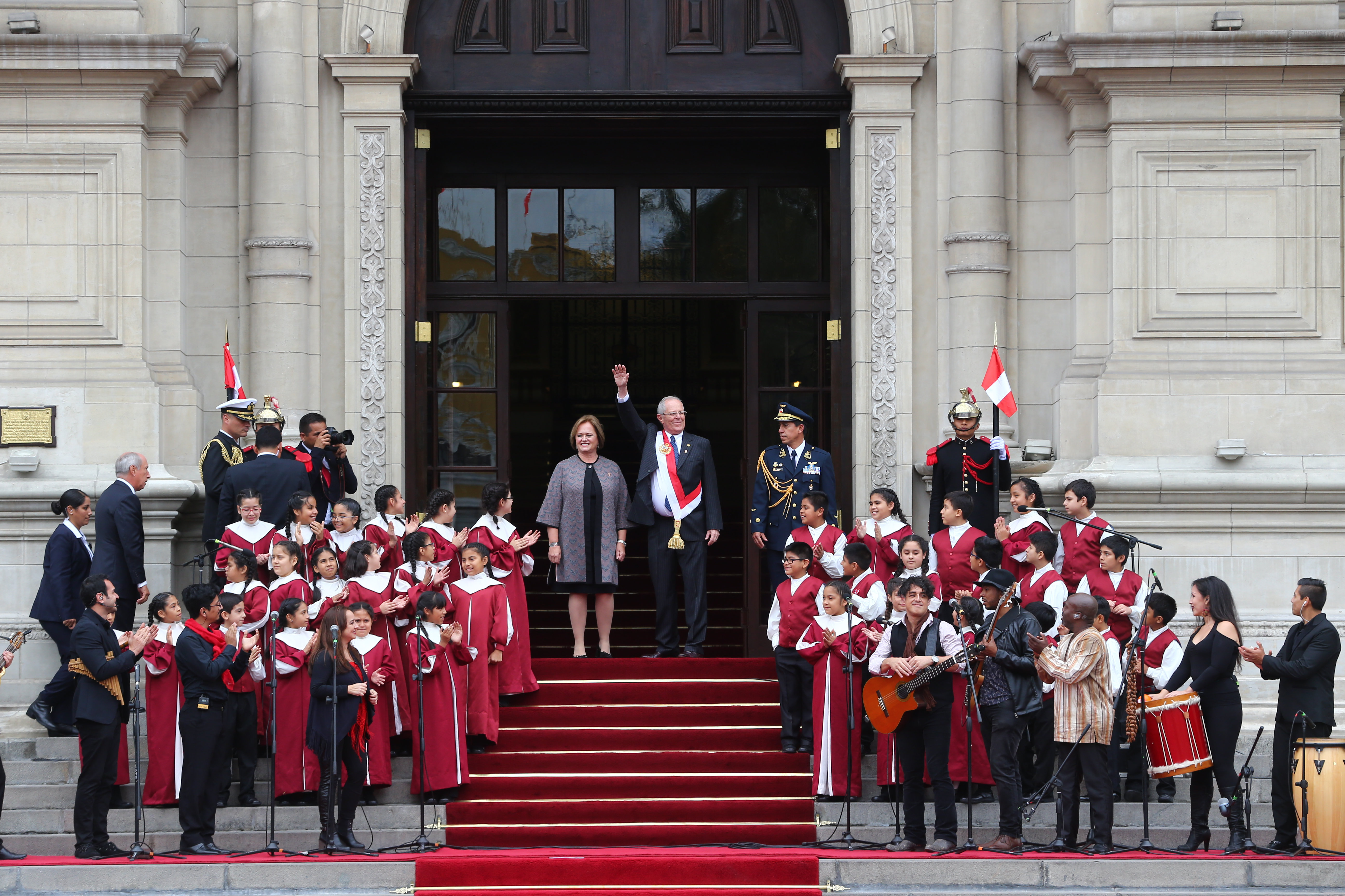 Un merecido y sentido homenaje rindió el presidente de la República, Pedro Pablo Kuczynski, al personal de las Fuerzas Armadas y del Centro de Operaciones de Emergencia Nacional (COEN), que se ubicaron en “primera fila” para atender a la población durante la emergencia causada por el fenómeno climático Niño Costero. “Deseo tomar un momento del tiempo de todos para rendir homenaje y expresar mi gratitud, tanto personal como de toda la Nación, a aquellos miembros del Estado que estuvieron en primera fila durante la emergencia que originó el Niño Costero”, expresó en el hemiciclo del Congreso de la República, al inicio de su mensaje a la Nación por Fiestas Patrias.